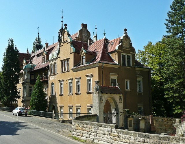 Cotta: Blick zum Schloss